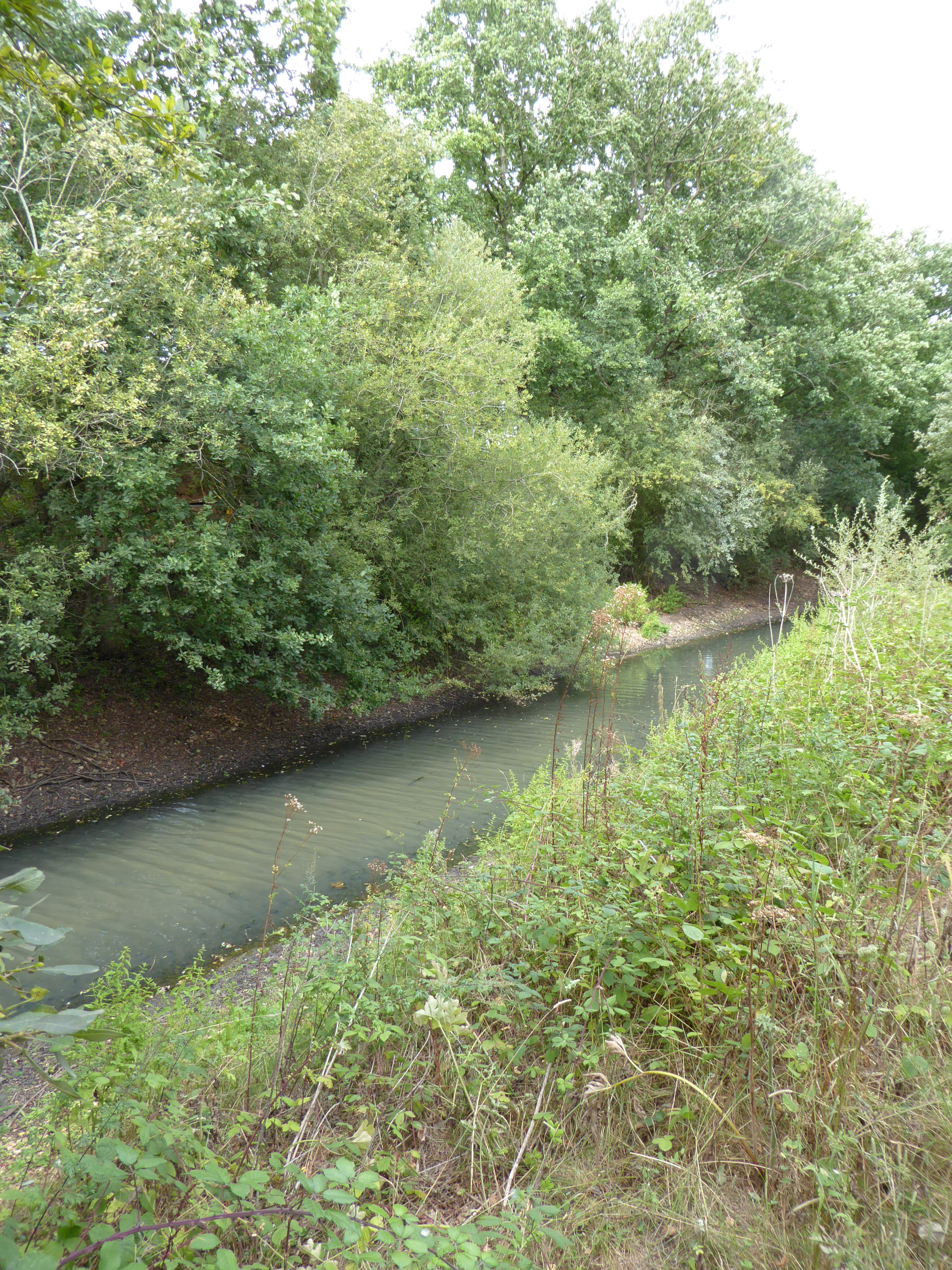 Canal Louis XIV de Dallonville, Bailleau-l'évêque, Eure-et-Loir (France).